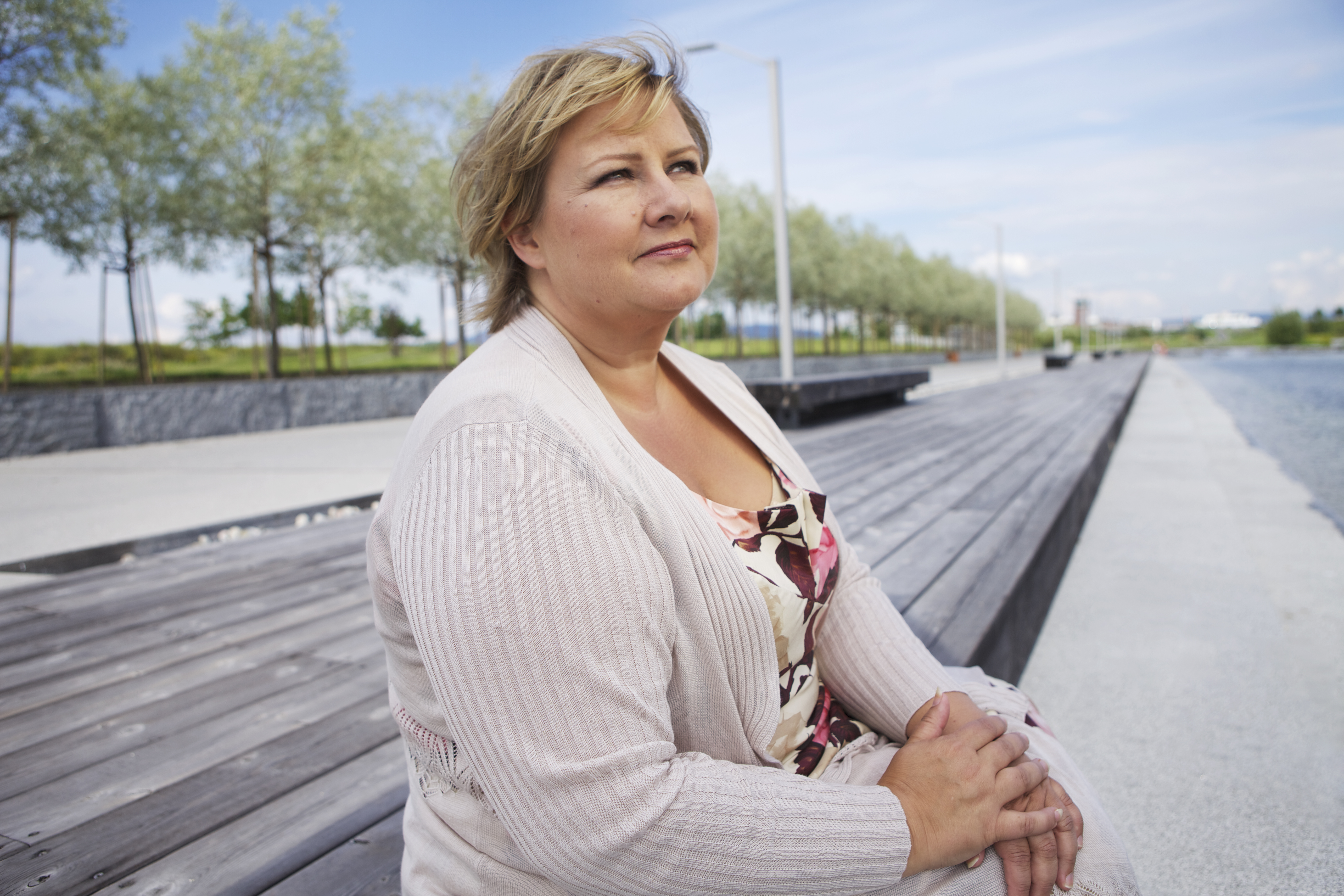 Erna Solberg, leder i Høyre.